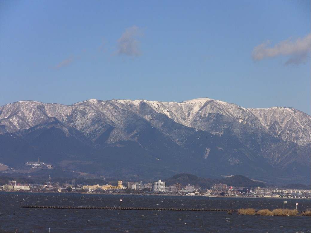 冬の比良山